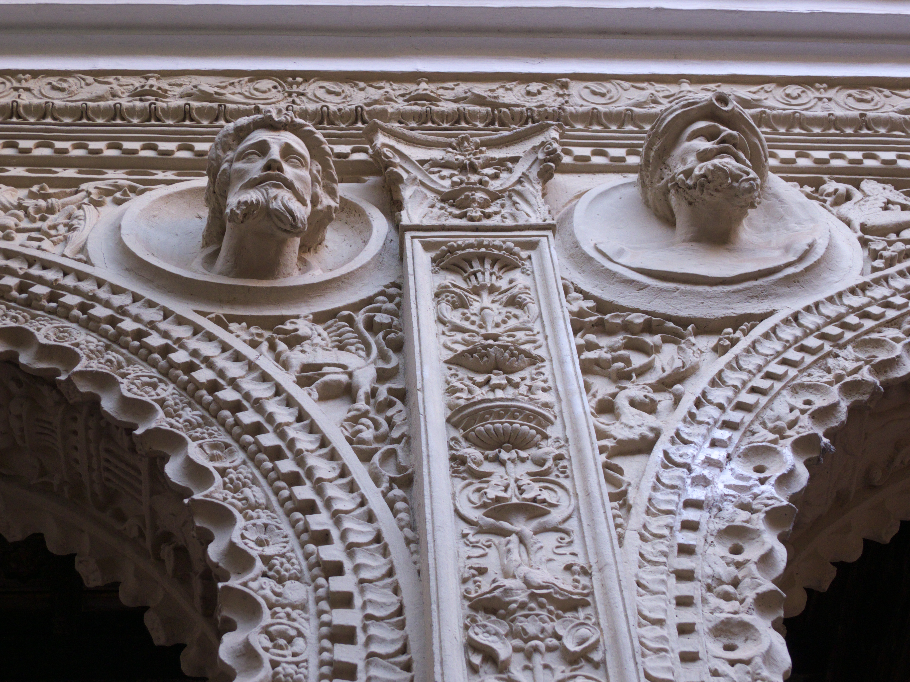 El canónigo Lorenzo Suárez de Figueroa, ocupante de la casa, influenciado por la obra de Jorge de Montemayor Los siete libros de Diana, decora el patio principal con las formas renacentistas (1542).